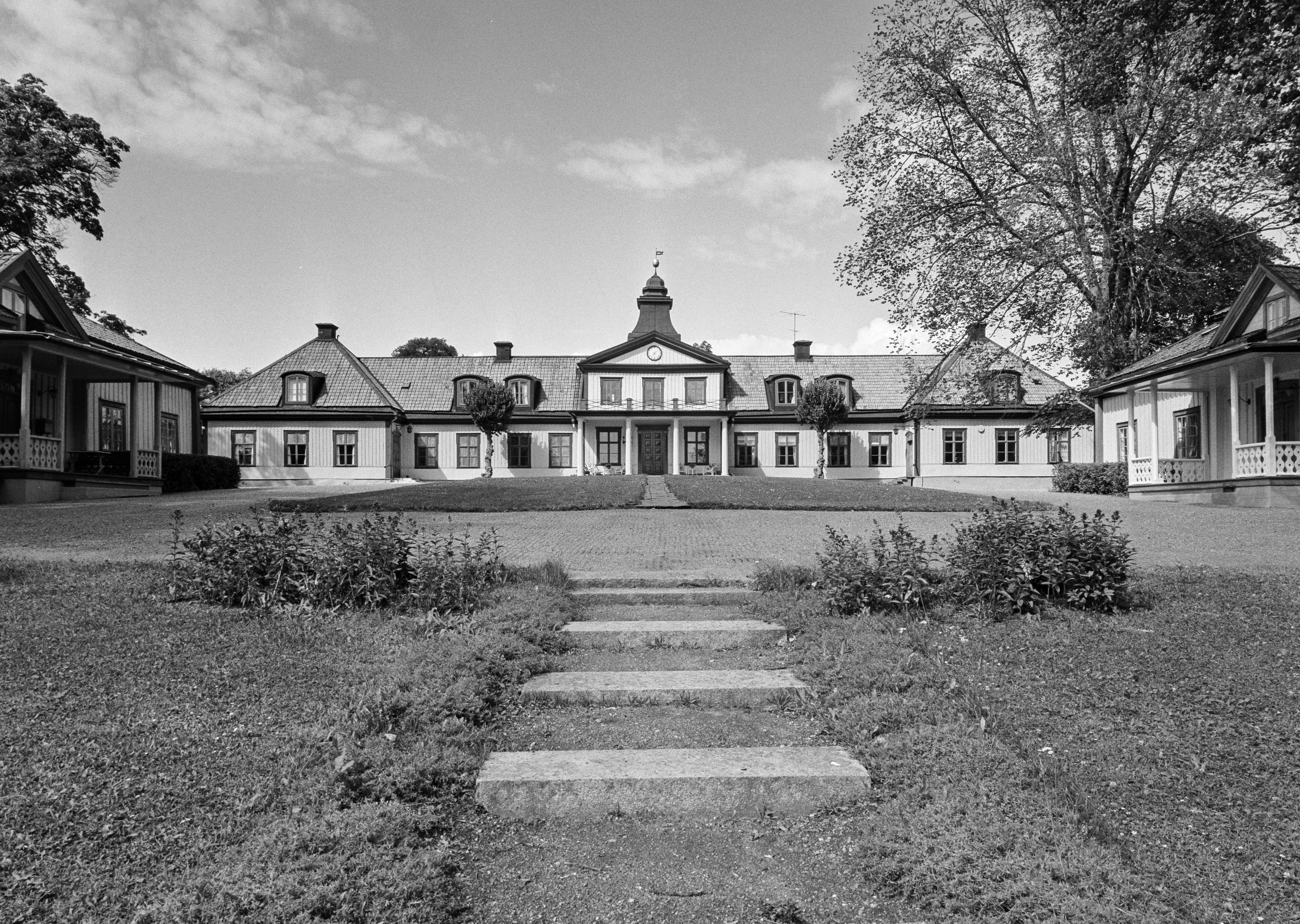 Edeby gård Ripsa socken, huvudbyggnad